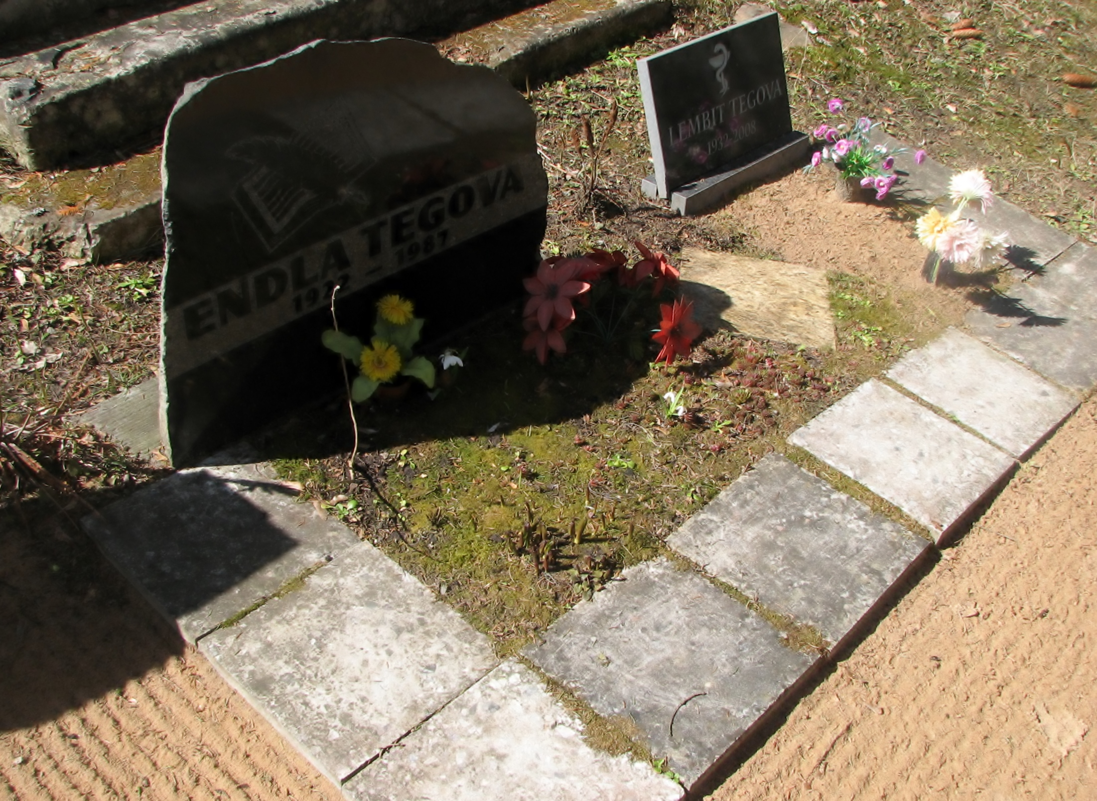 Endla ja Lembit Tegova haud Kudjape kalmistul